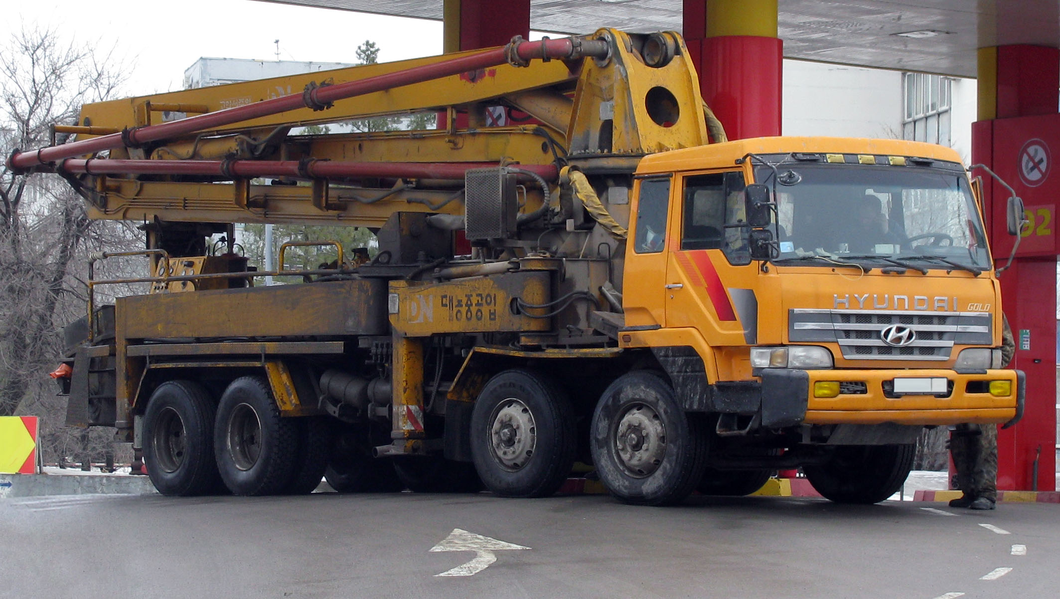 Hyundai Gold